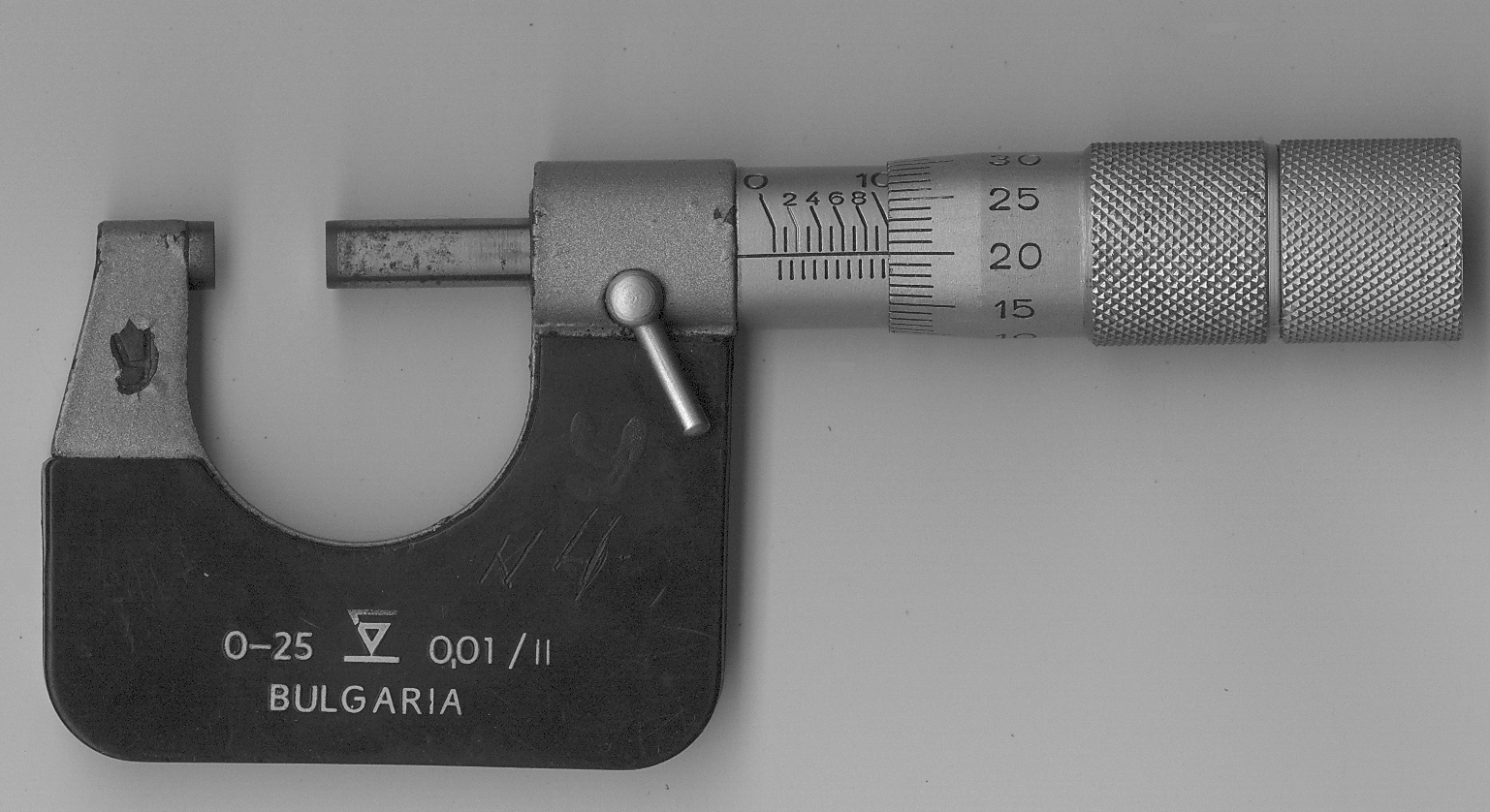 Микрометр для внешних размеров от 0 до 25 мм, цена деления 0,01 мм, измеренный размер 9,7 мм.